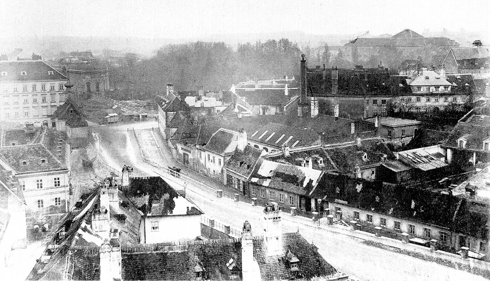 Alserbachstraße (an der rechten Seite die Nr. 2 bis ca. 12) in Wien-Alsergrund (9. Gem.-Bezirk). Blick aus einem Haus auf der Nußdorfer Straße Richtung Markthalle (heute anstelle der Häusergruppe im Vordergrund). Im Hintergrund der an der Alserbachstraße liegende Teil des Palais Liechtenstein.